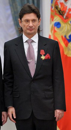 начальник главного управления стратегического развития и инвестиционного анализа ОАО «Нефтяная компания «ЛУКОЙЛ» Леонид Федун.